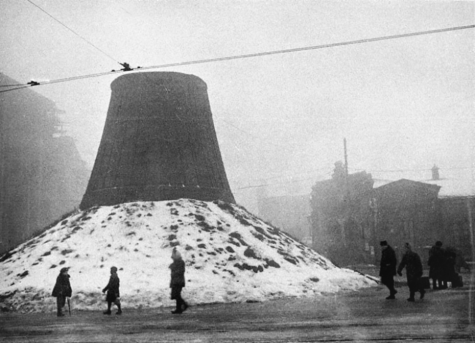 Ленинград блокадный. Укрытый памятник Ленину у Финляндского вокзала